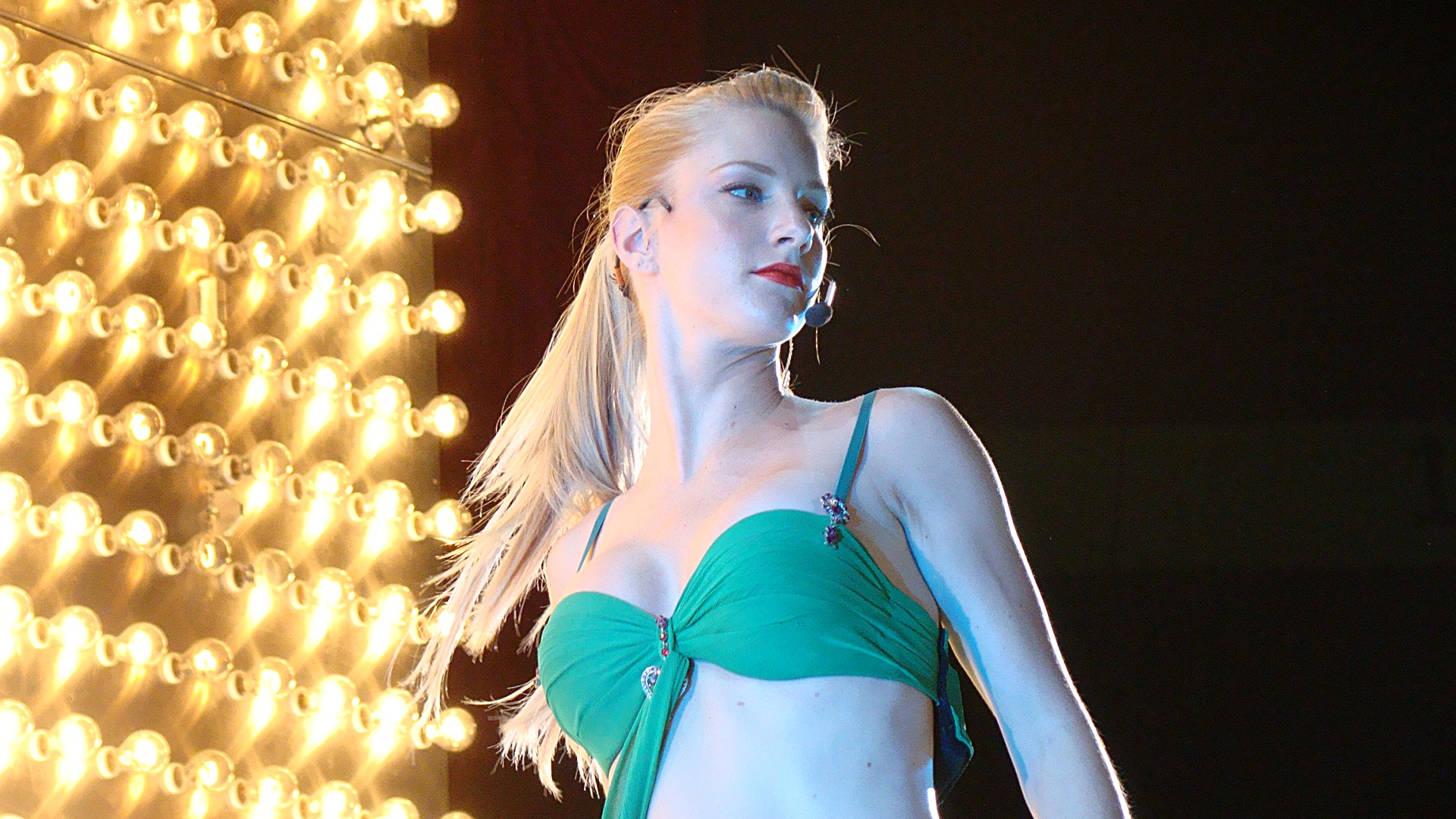 I'm A Slave 4 U